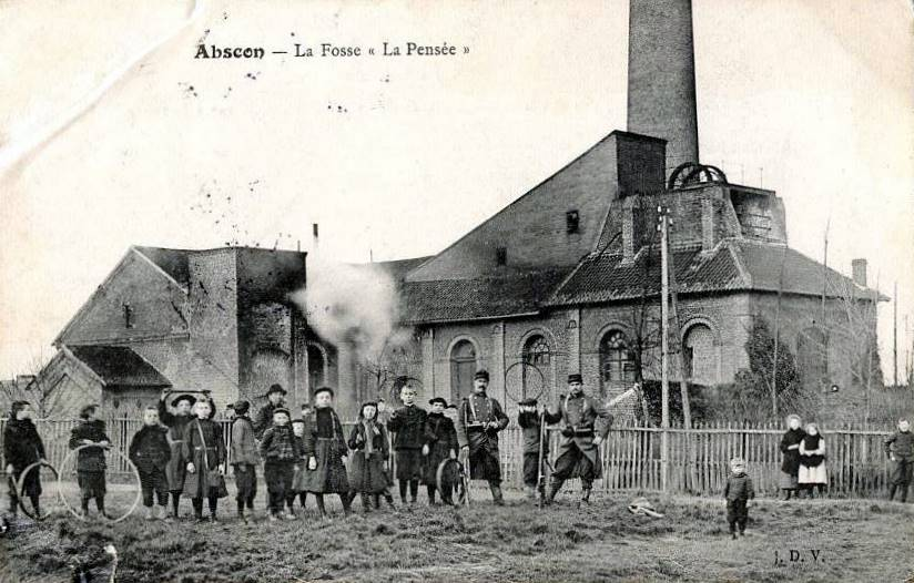 Fosse La Pensée d'Abscon fermée en 1871